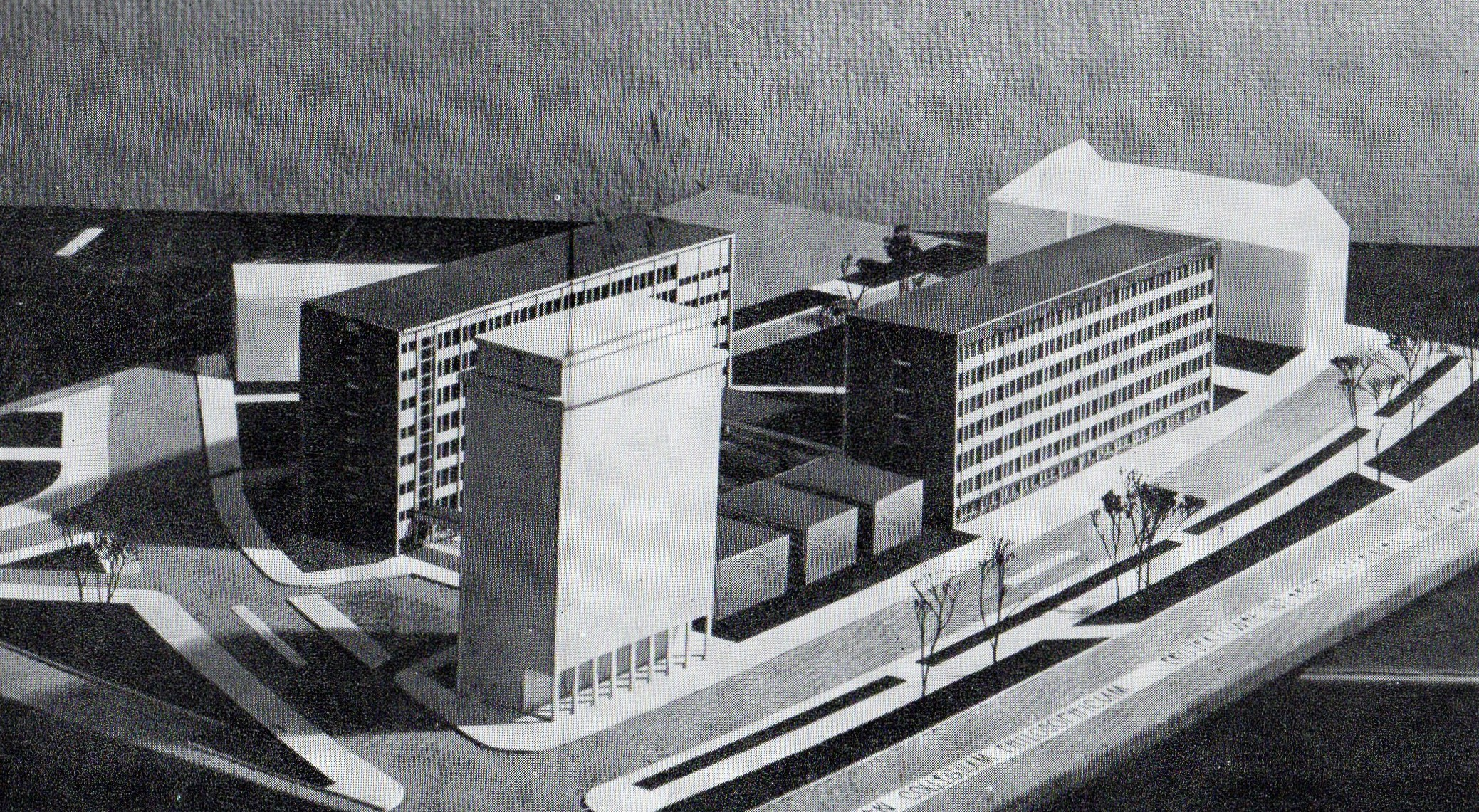 Nie do końca zrealizowany proj. Collegium Novum w Poznaniu.